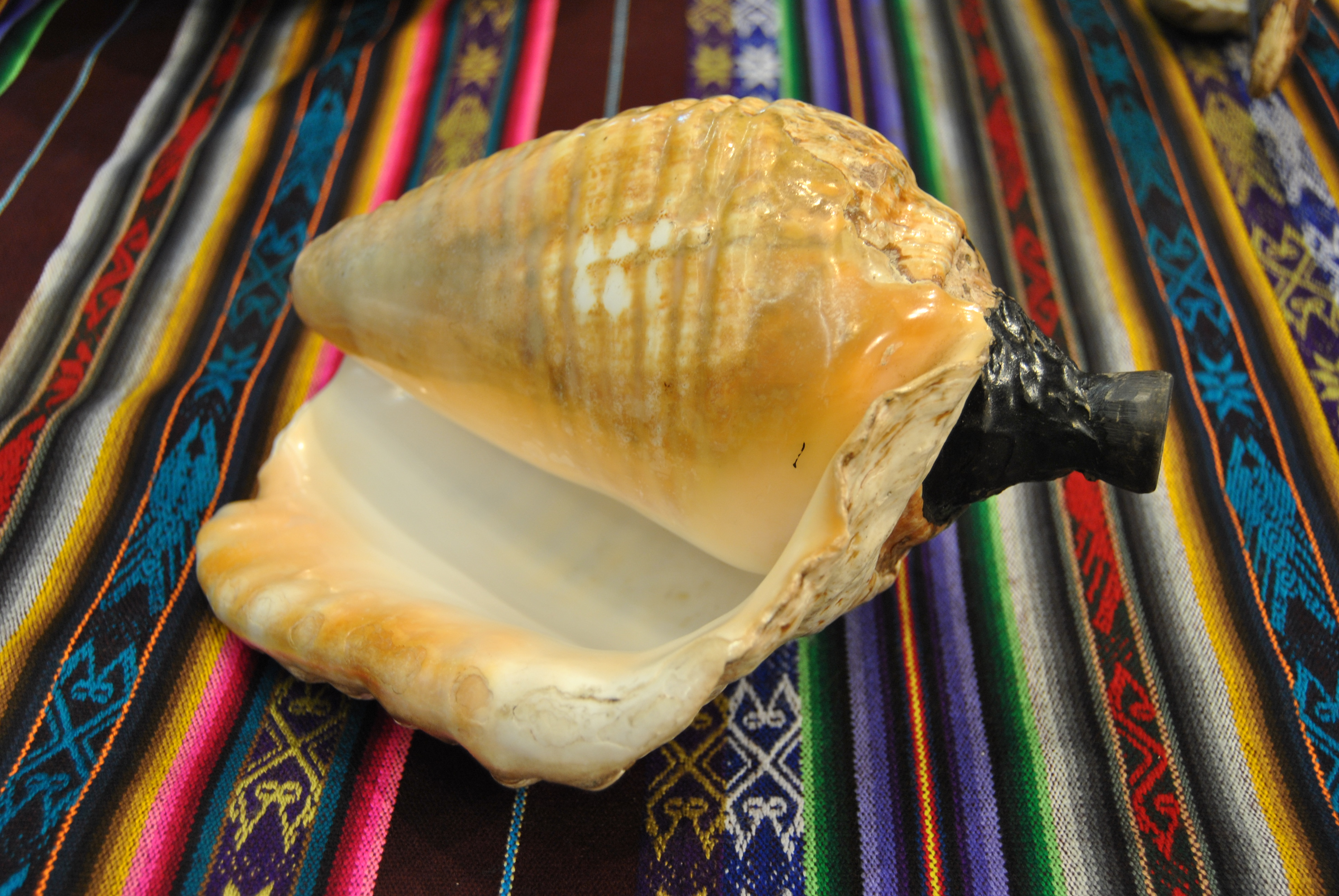 Trompeta con caracola del Perú